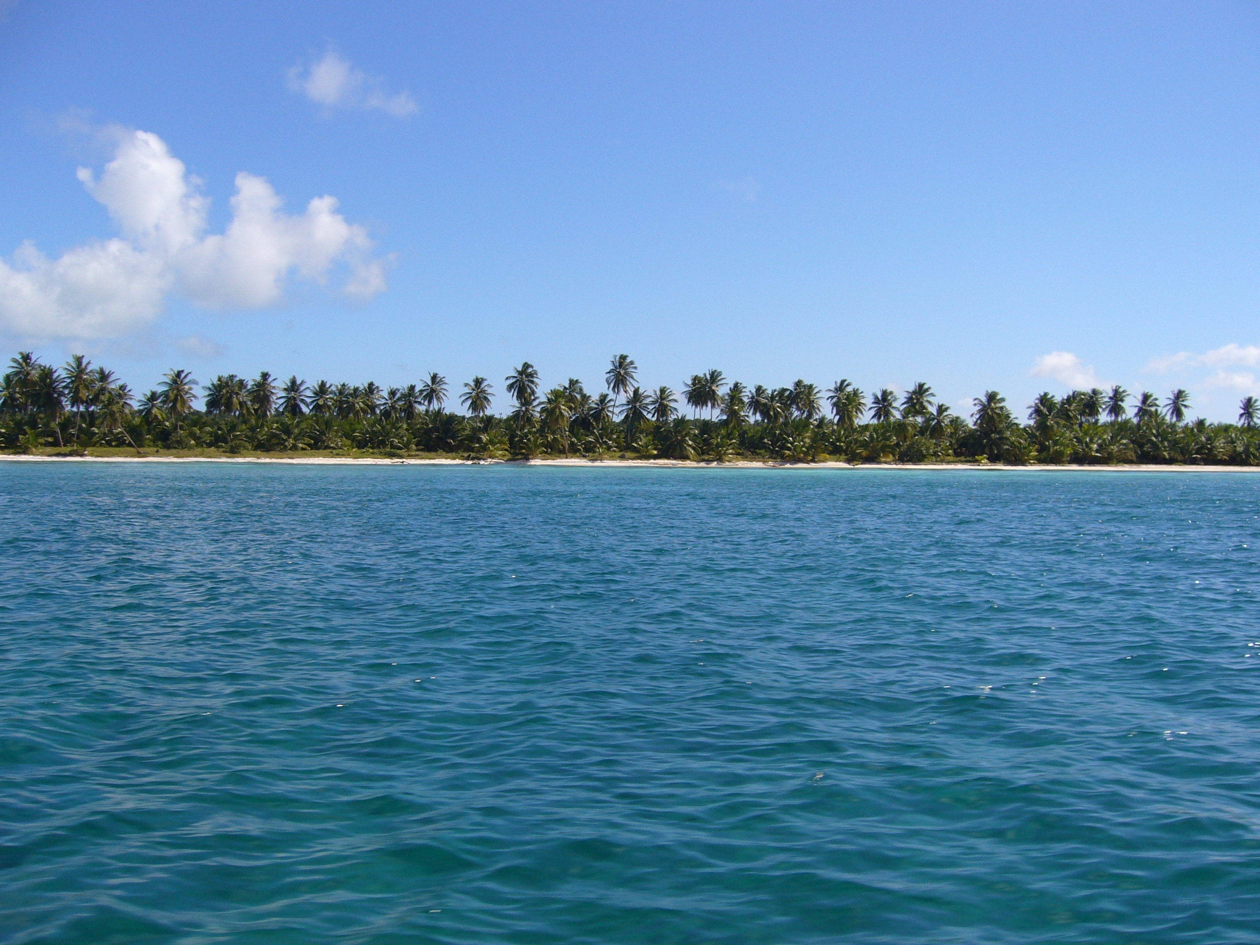 Parque National Del Este